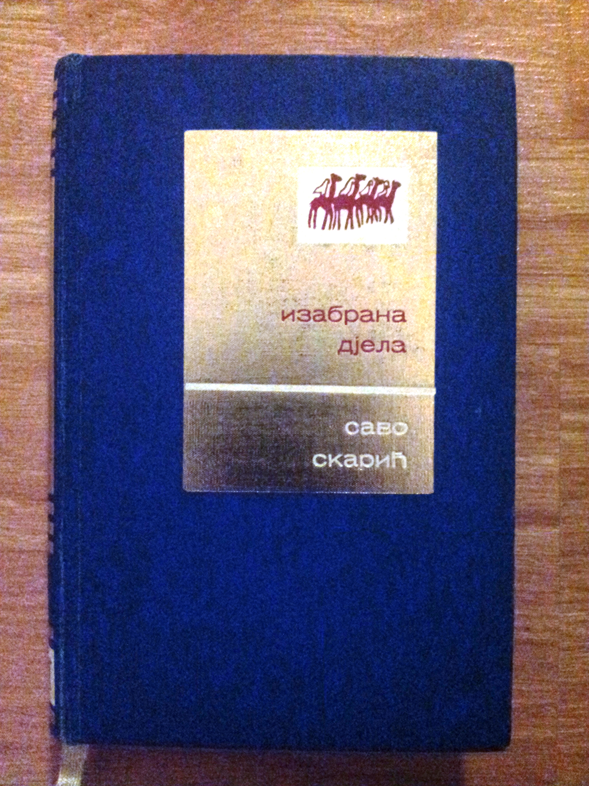 Knjiga Save Skarića "Izabrana djela", priredio Dejan Đuričković